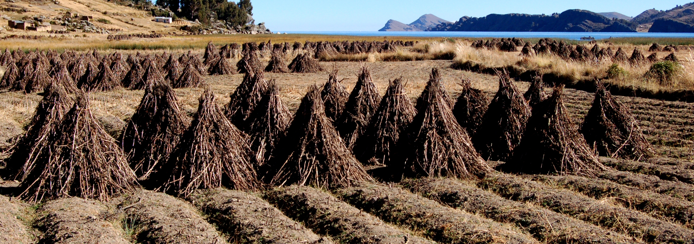 Agriculture in Bolivia.